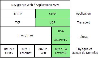 OSI - CoAP